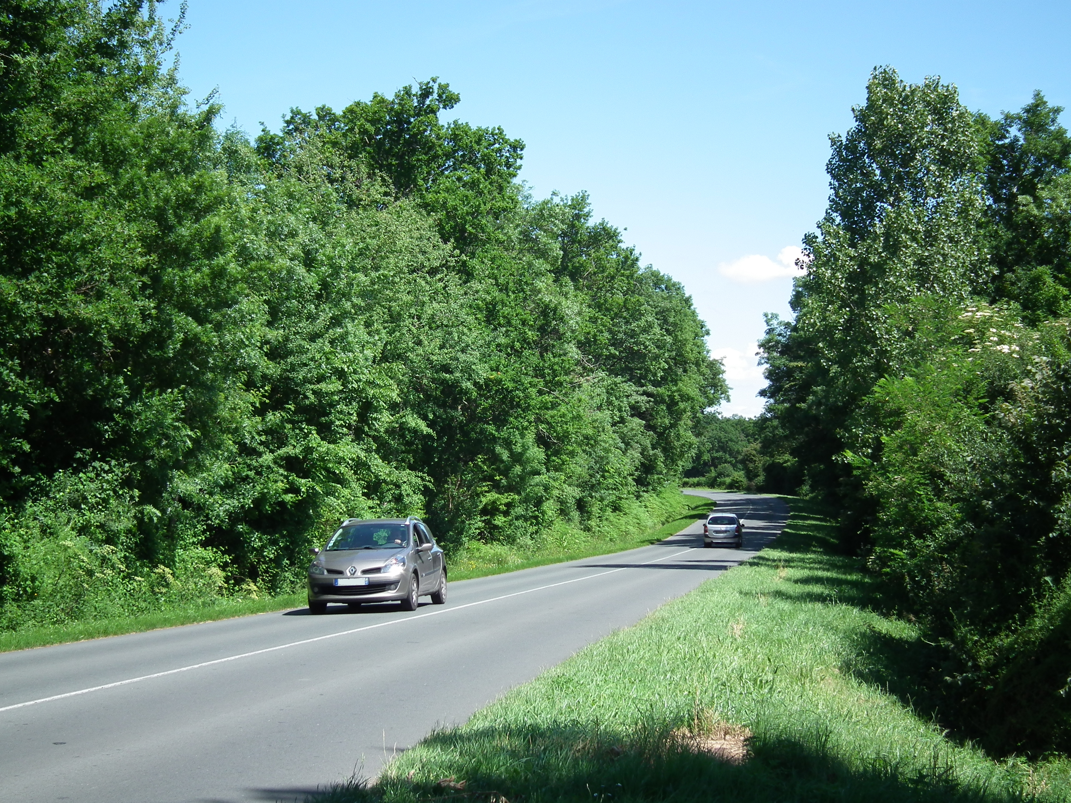 Bois à l'entrée d'Etaules, Charente-Maritime